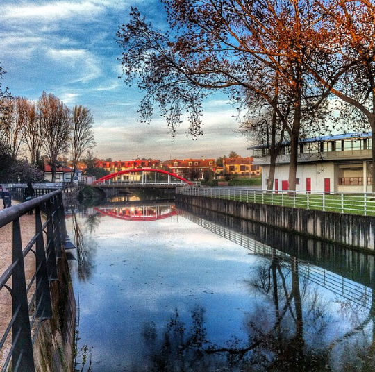 Río Piles en el entorno de Las Mestas, Gijón.